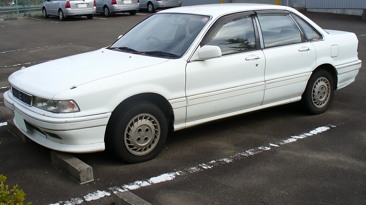 三菱・エテルナサヴァ（Mitsubishi_Eterna_Sava）